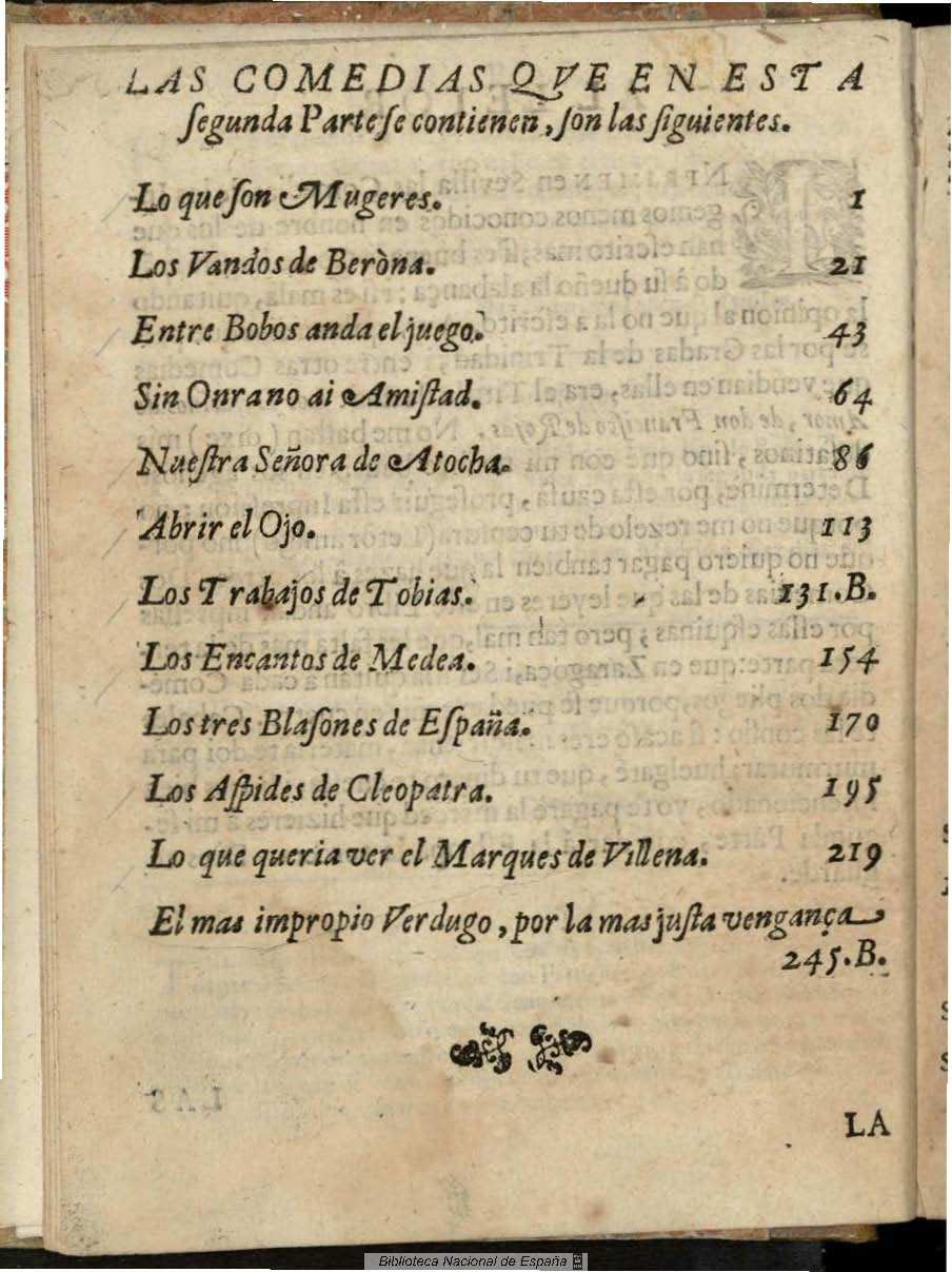 Segunda parte de las comedias de Don Francisco de Rojas Zorrilla ... Autor: Rojas Zorrilla, Francisco de (1607-1648) Fecha: 1645 Datos de edición: En Madrid en la Imprenta de Francisco Martinez a costa de Pedro Coello ... Contenido: Lo que son mugeres, (h. 1-20v.) ; Los vandos de Berona, (h. 21-42v.) ; Entre bobos anda el juego, 8h. 43-63v.) ; Sin honra no ay amistad, (h. 64-88) ; Nuestra Señora de Atocha, (h. 88v-112) ; Abrir el ojo, (h. 112v-131) ; Los trabajos de Tobias (h. 131v-153v) ; Los encantos de Medea, (h. 154-169) ; Los tres blasones de España, (h. 169v-194v) ; Los aspides de Cleopatra, (h. 195-218v) ; Lo que queria ver el Marques de Villena, (h. 219-245) ; El mas impropio verdugo, por las mas justa vengança, (h.245v-259v)Lo que son mugeres, h. 1-20v ; Los vandos de Berona, h. 21-42v ; Entre bobos anda el juego, h. 43-63v ; Sin onra no hay amistad, h. 64-88 ; Nuestra Señora de Atocha, h. 88v-112 ; Abrir el ojo, h. 112v-131 ; Los trabajos de Tobias h. 131v-153v ; Los encantos de Medea, h. 154-169 ; Los tres blasones de España, h. 169v-194v ; Los aspides de Cleopatra, h. 195-218v ; Lo que queria ver el Marques de Villena, h. 219-245 ; El mas impropio verdugo, por las mas justa vengança, h.245v-259v